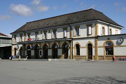 Bahnhof von Yverdon-les-Bains